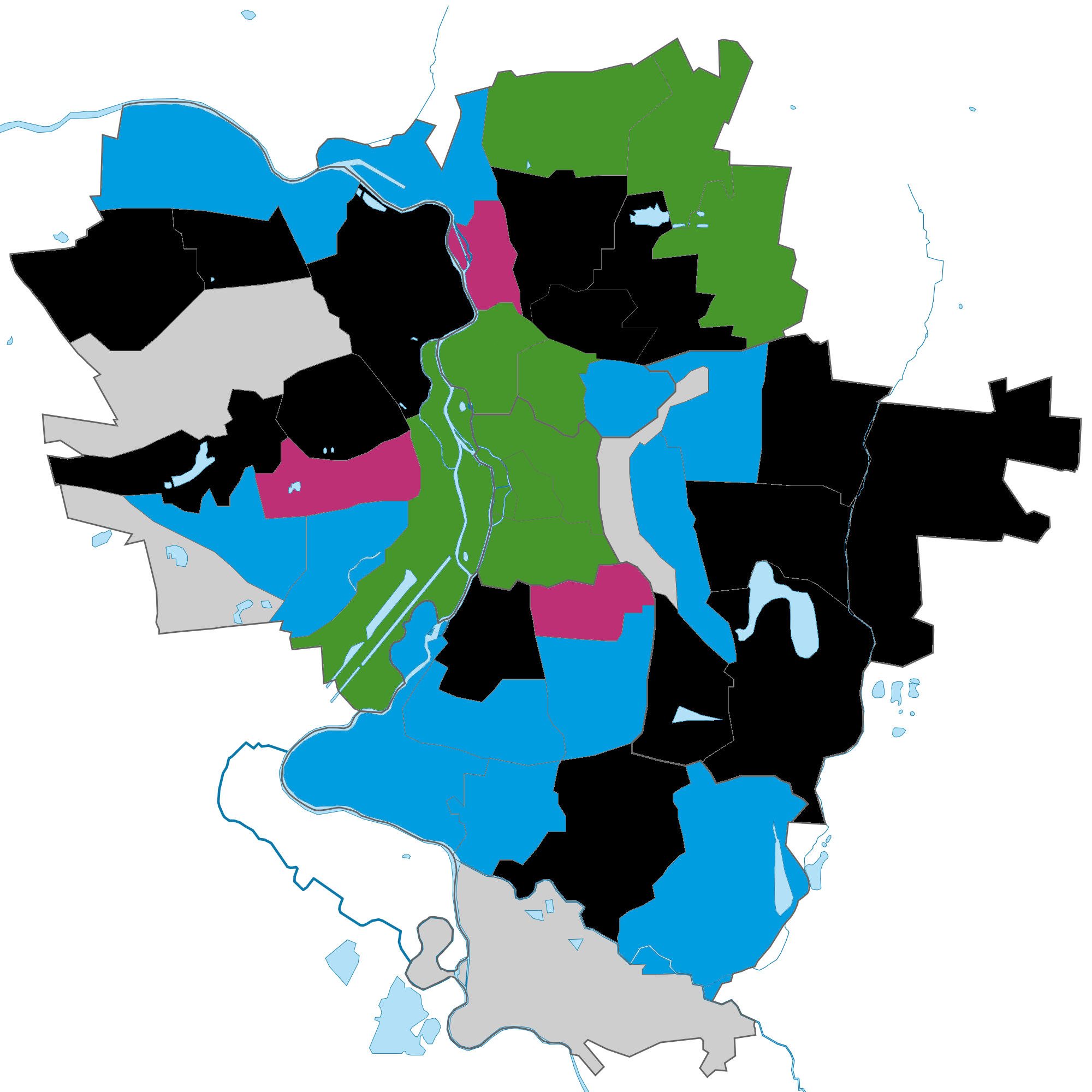 Vorlage von TUBS File:Halle (Saale) Stadtteil 1 01.svg